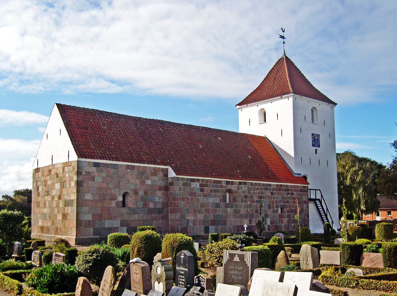 fra nordøst